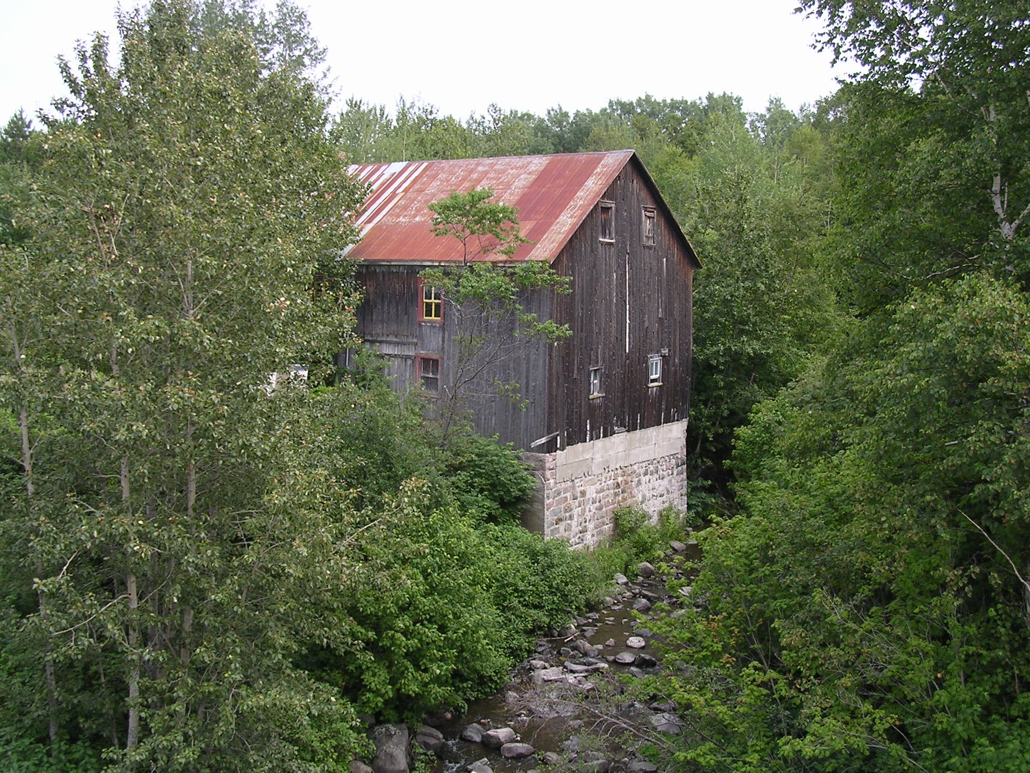 Moulin de Trois-Pistoles (Bas-Saint-Laurent, Québec). Moulin à eau, moulin à farine.